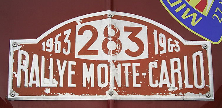 Placa Rally Montecarlo (1963)